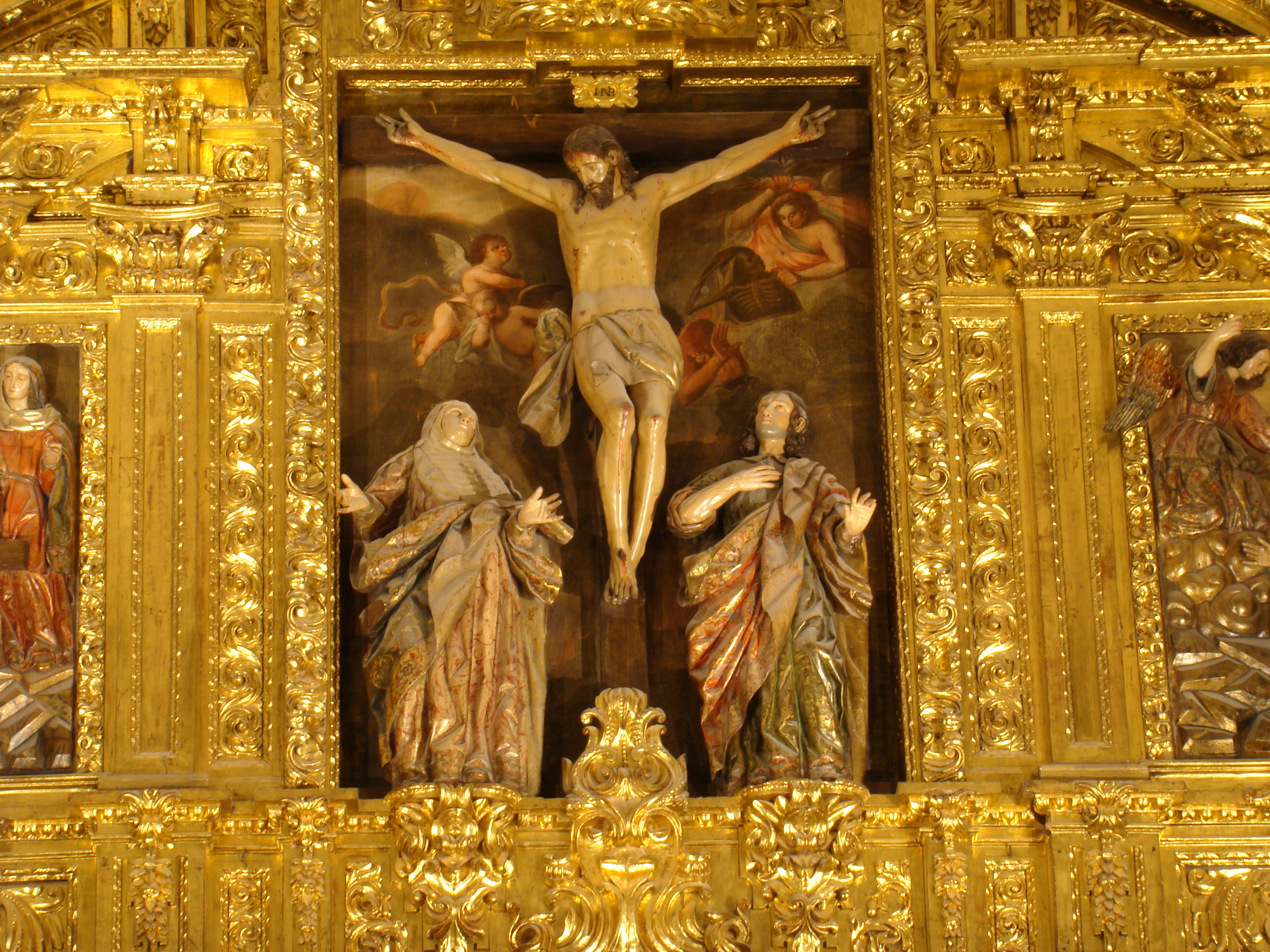 Iglesia de San Felipe Neri en Valladolid, España. Detalle del retablo mayor. Ático.